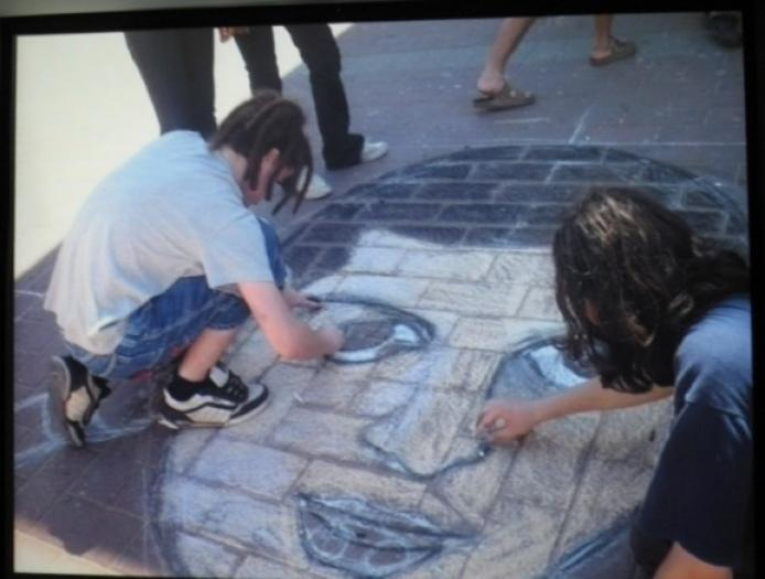 ערב פתיחת התערוכה "כשהכריש והדג נפגשו לראשונה" על פי ספרו של גלעד שליט בספרייה "כותר שקמה" בראשון-לציון. התמונה, מתוך מצגת של תלמידי גימנסיה "גן-נחום".